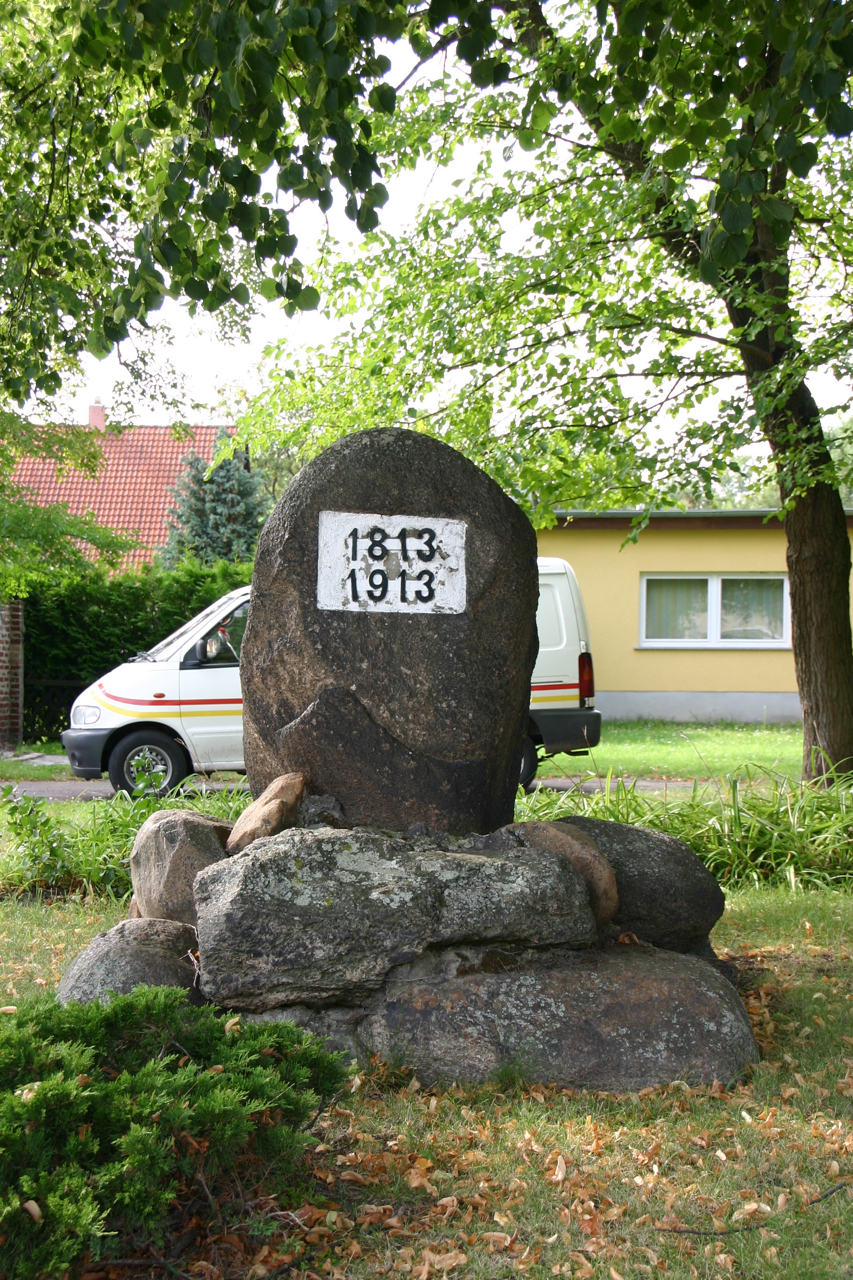 Elsnigk ist einOrtsteil der Gemeinde Osternienburger Land im Landkreis Anhalt-Bitterfeld in Sachsen-Anhalt.